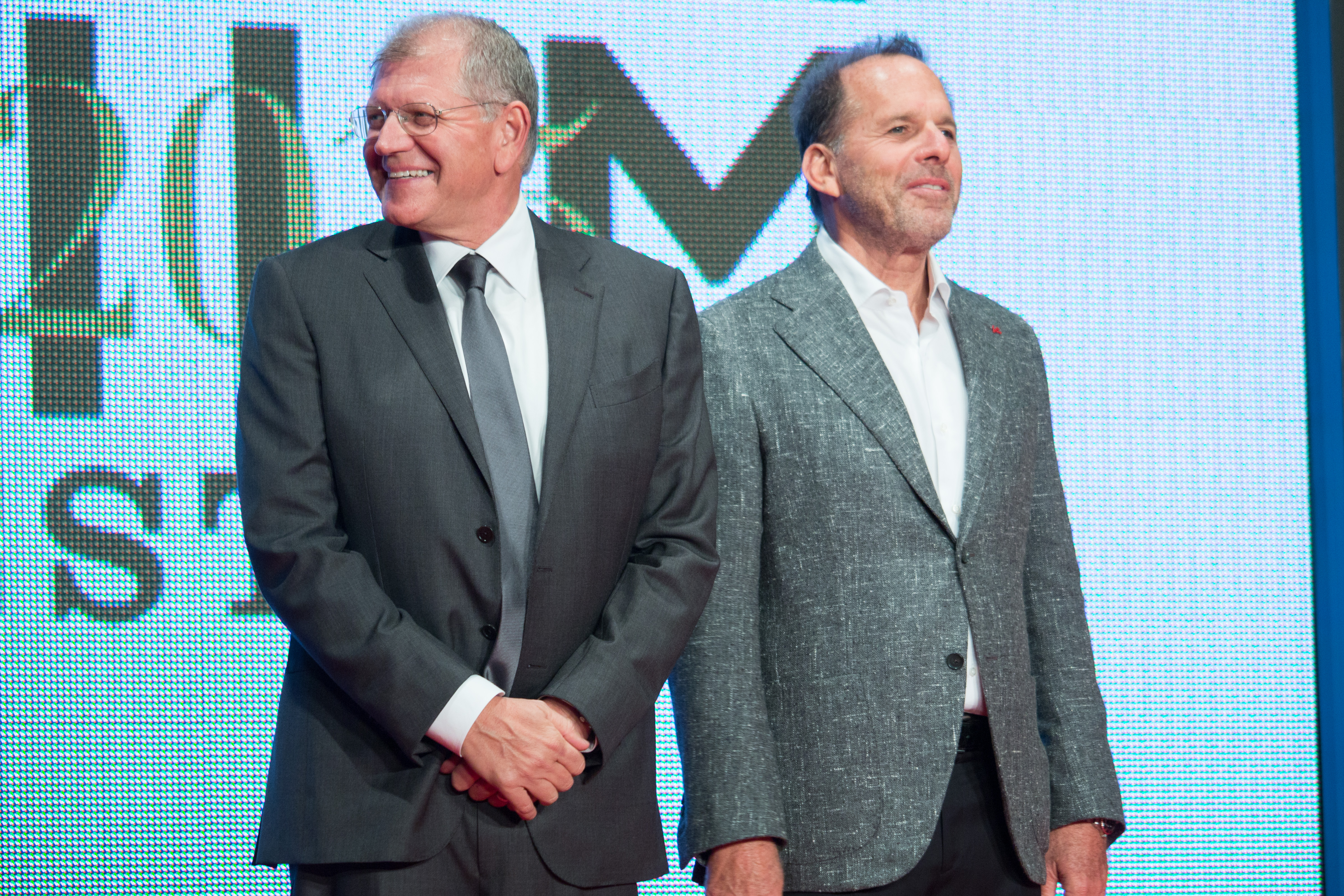 第28回 東京国際映画祭 オープニングセレモニー ロバート・ゼメキス ジャック・ラプケ (ザ・ウォーク)